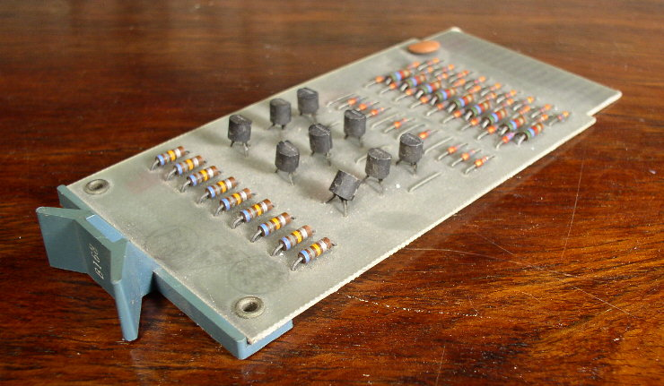 KA10 module (end view)